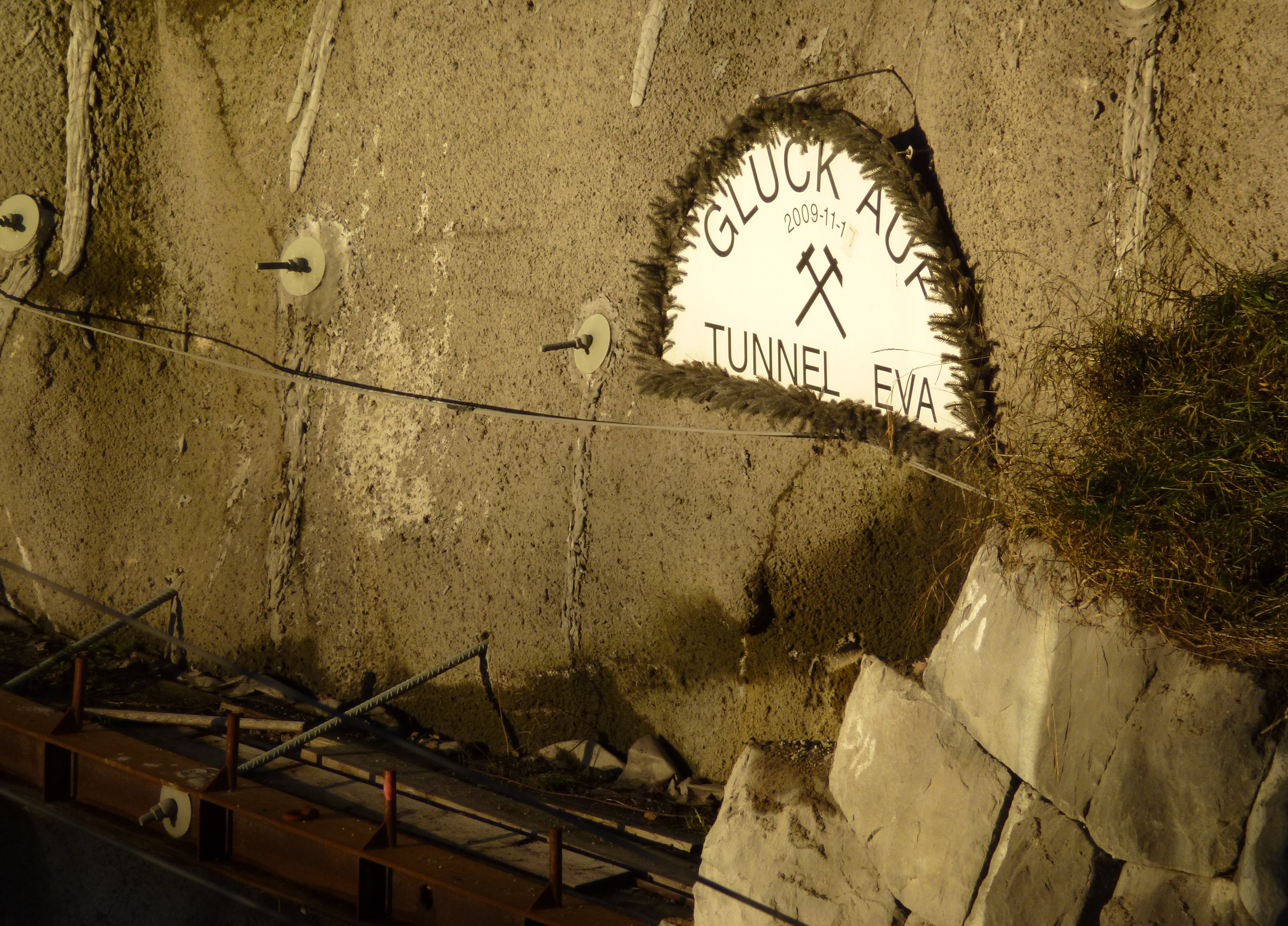 Citybanans Vasatunnel "Glück auf"